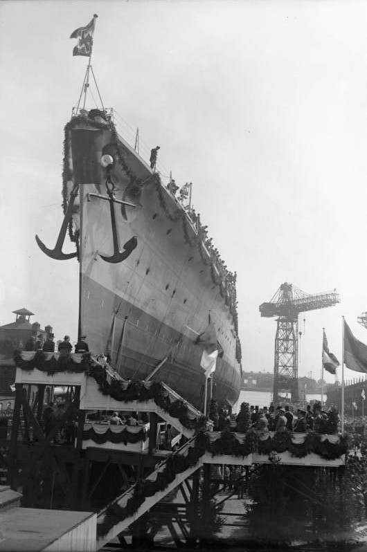 Der feierliche Stapellauf des neuen deutschen Kreuzers Köln ! Blick auf die gigantische Grösse des neuen deutschen Kreuzers Köln während der Tauffeierlichkeiten mit Adenauer.